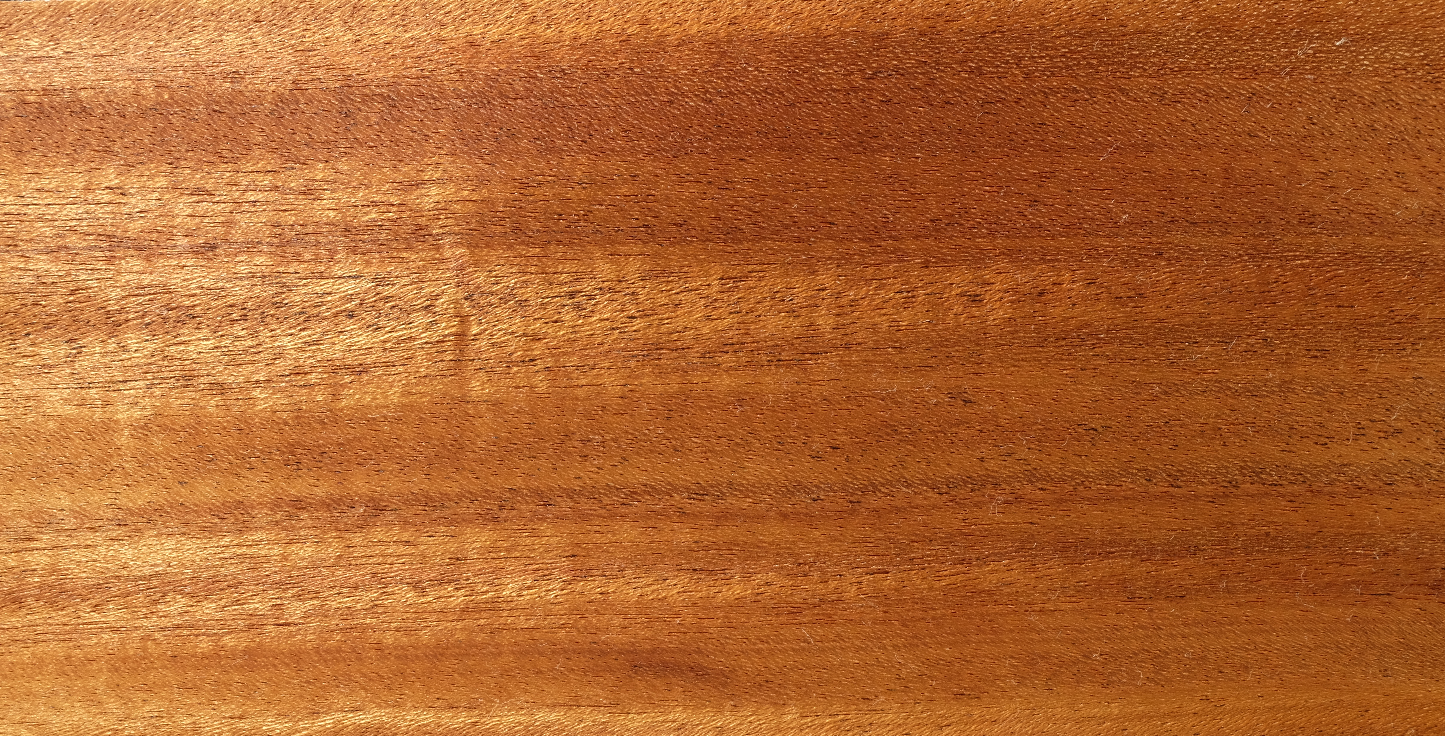 gemessertes Furnier des Khaya-Mahagoni, geölt, nicht geschliffen